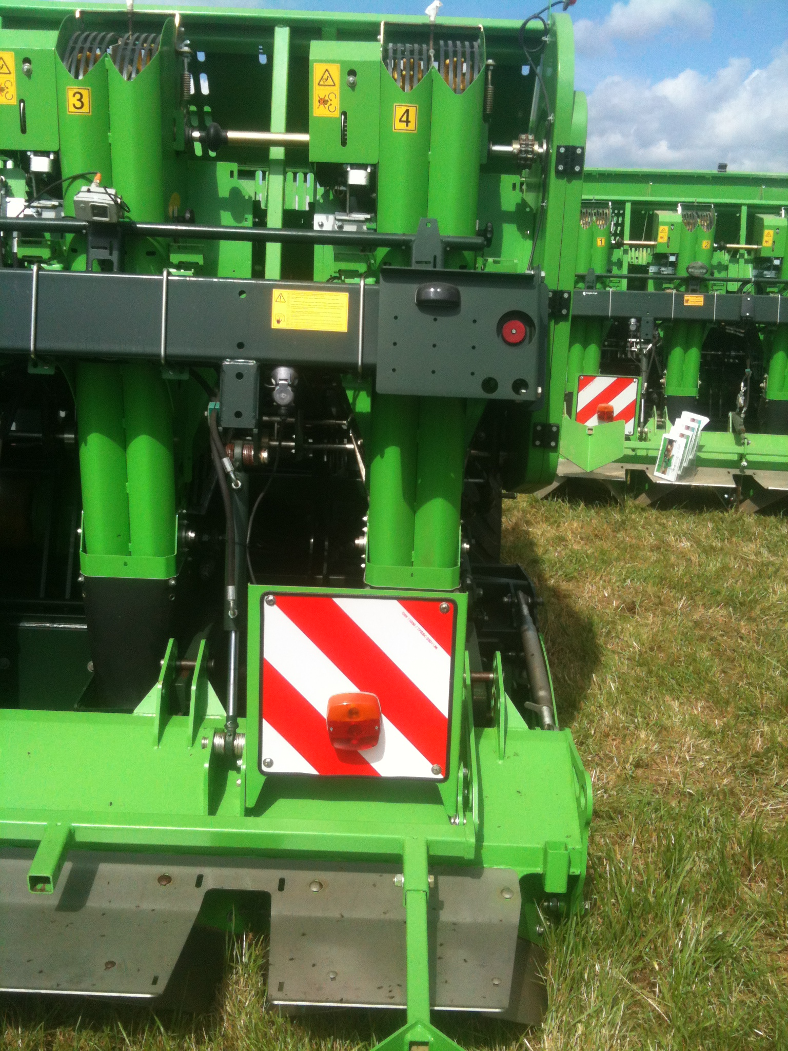 Miedema Kartoffelplfanzmaschine Allinone